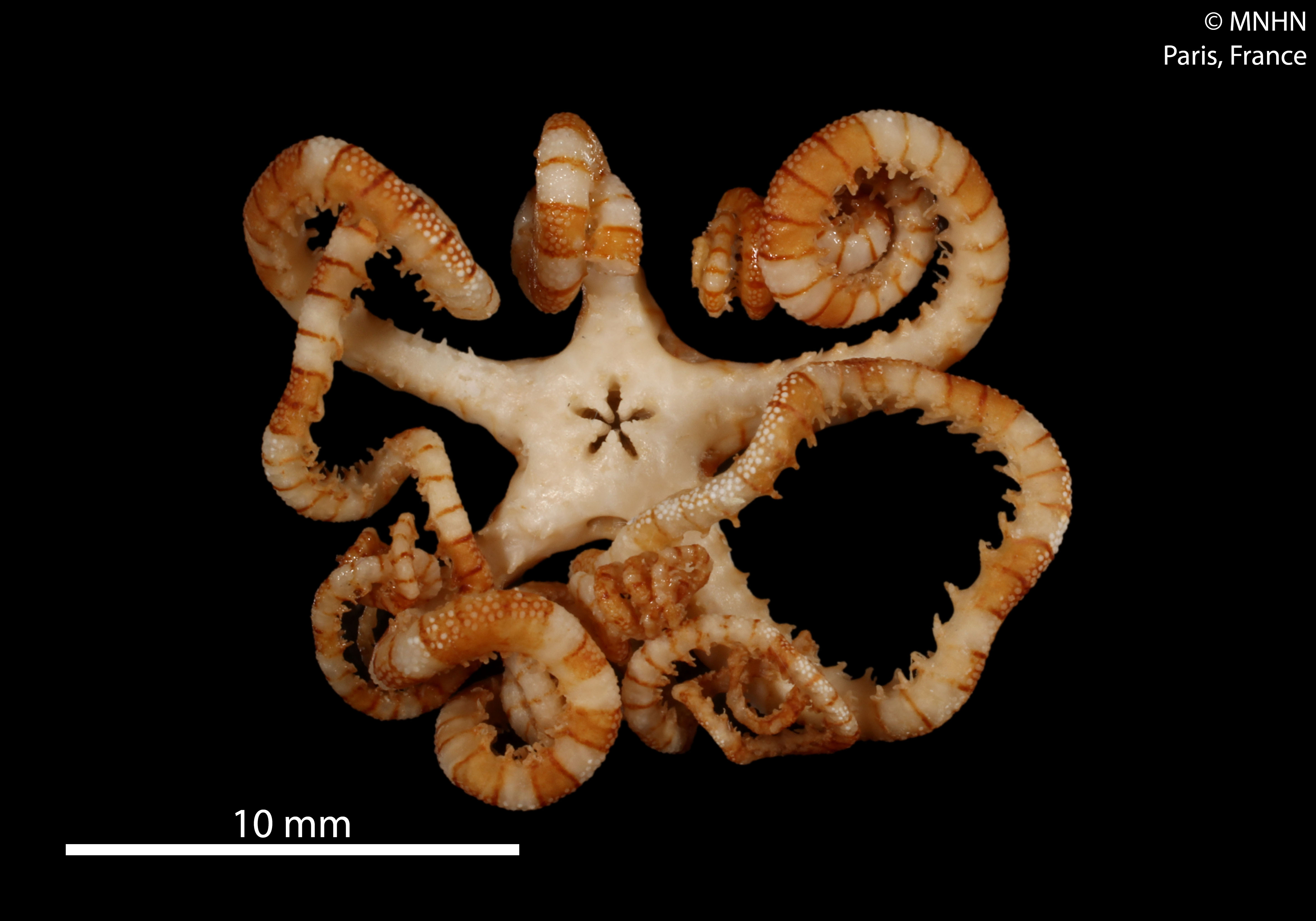 Astroceras aurantiacum (face oraleSpécimen MNHN-IE-2013-6052Collection : Échinodermes (IE)Muséum National d'Histoire Naturelle (Paris, France) Origine : Libellé du pays : ILES LOYAUTE Localité/Lieu-dit : Lifou Localité originale : Baie du Santal, Récif Shelter Expédition : LIFOU 2000 Numéro de station : 1461 Date de récolte : 2000-11-17/2000-11-23 Profondeur (mètres) : 100 -120 Coordonnées géographiques : 20° 54' 0 S 167° 2' 6.0144 E